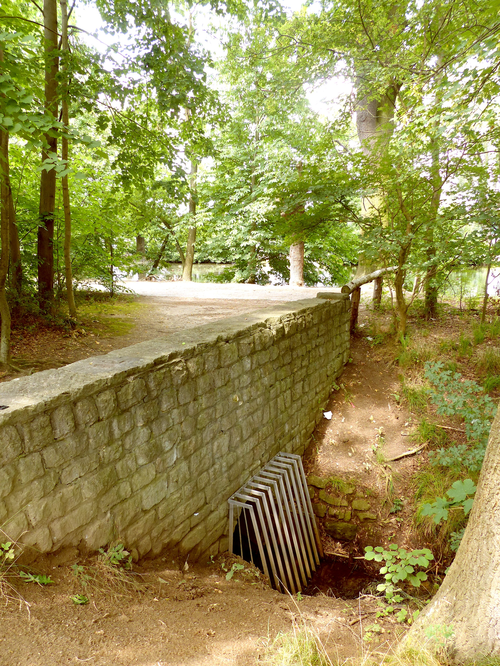 Mündung des Weddeler Grabens in die Riddagshäuser Teiche.